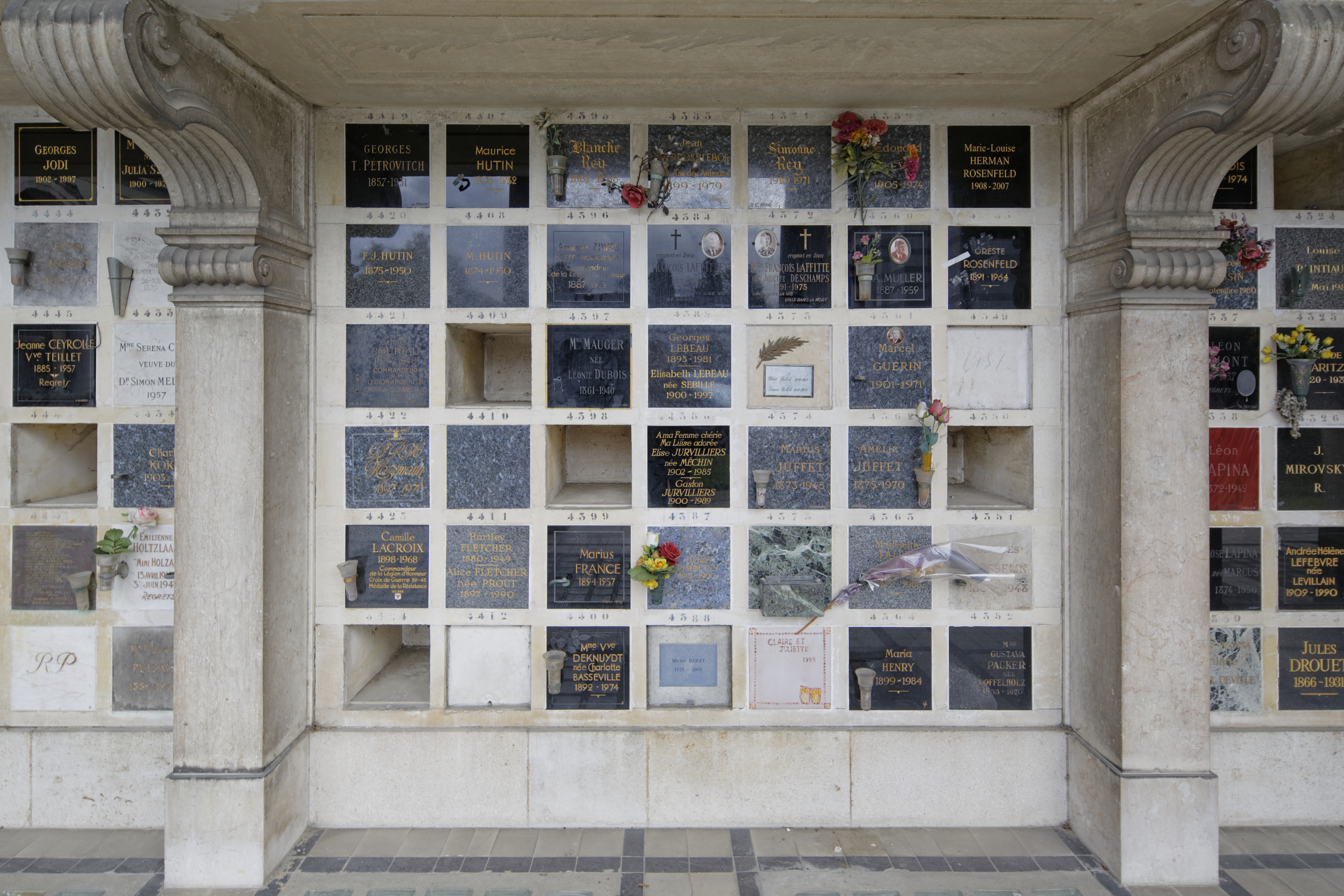 Cases du columbarium du cimetière du Père-Lachaise.